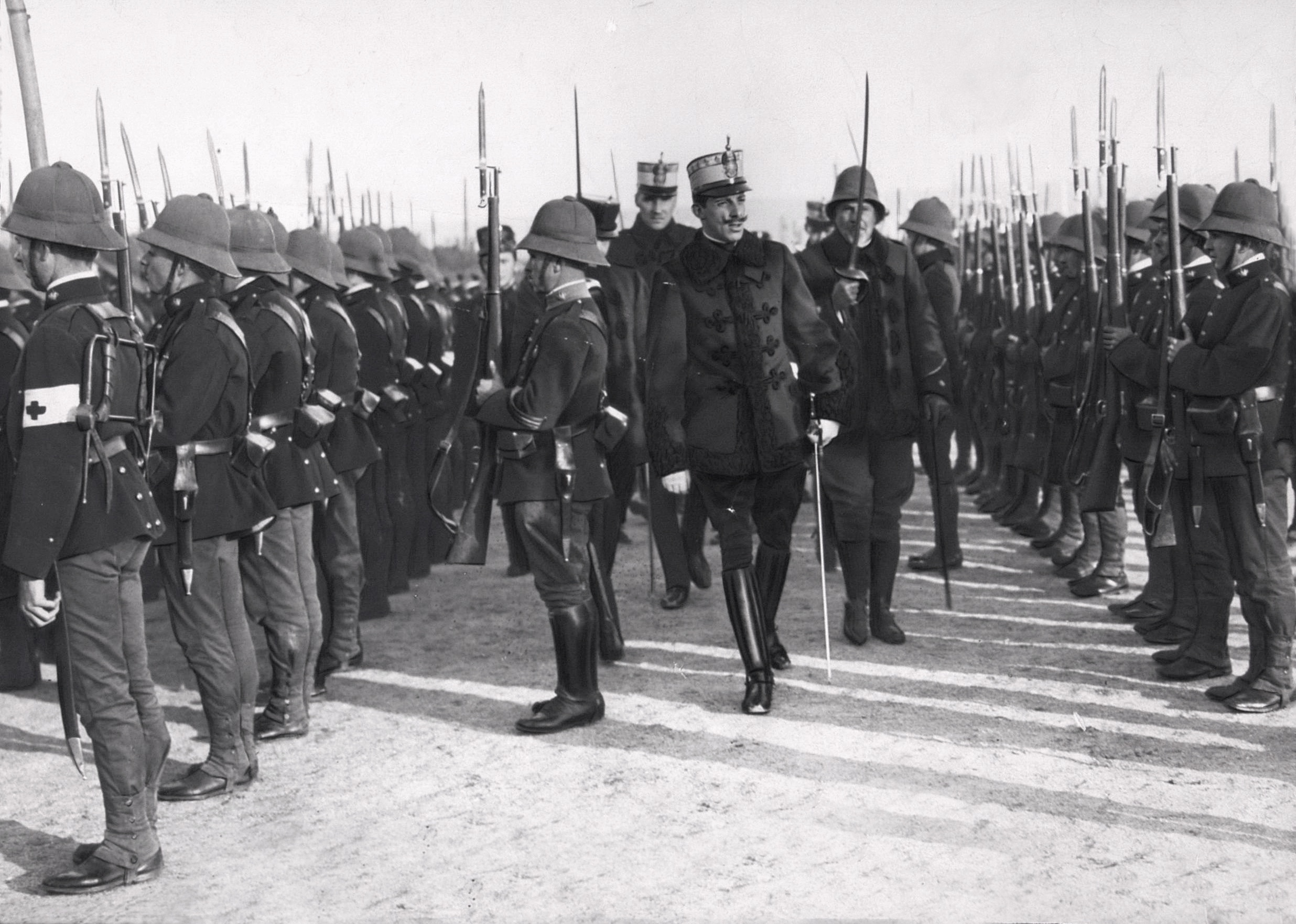 El rey Alfonso XIII de España pasando revista a las tropas destinadas en África